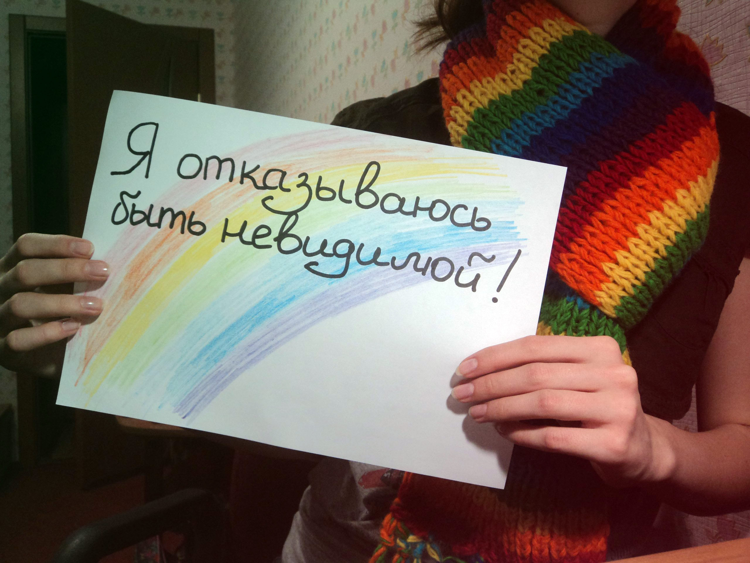 Одно из фото в проекте Дети-404. ЛГБТ-подростки. Мы есть!